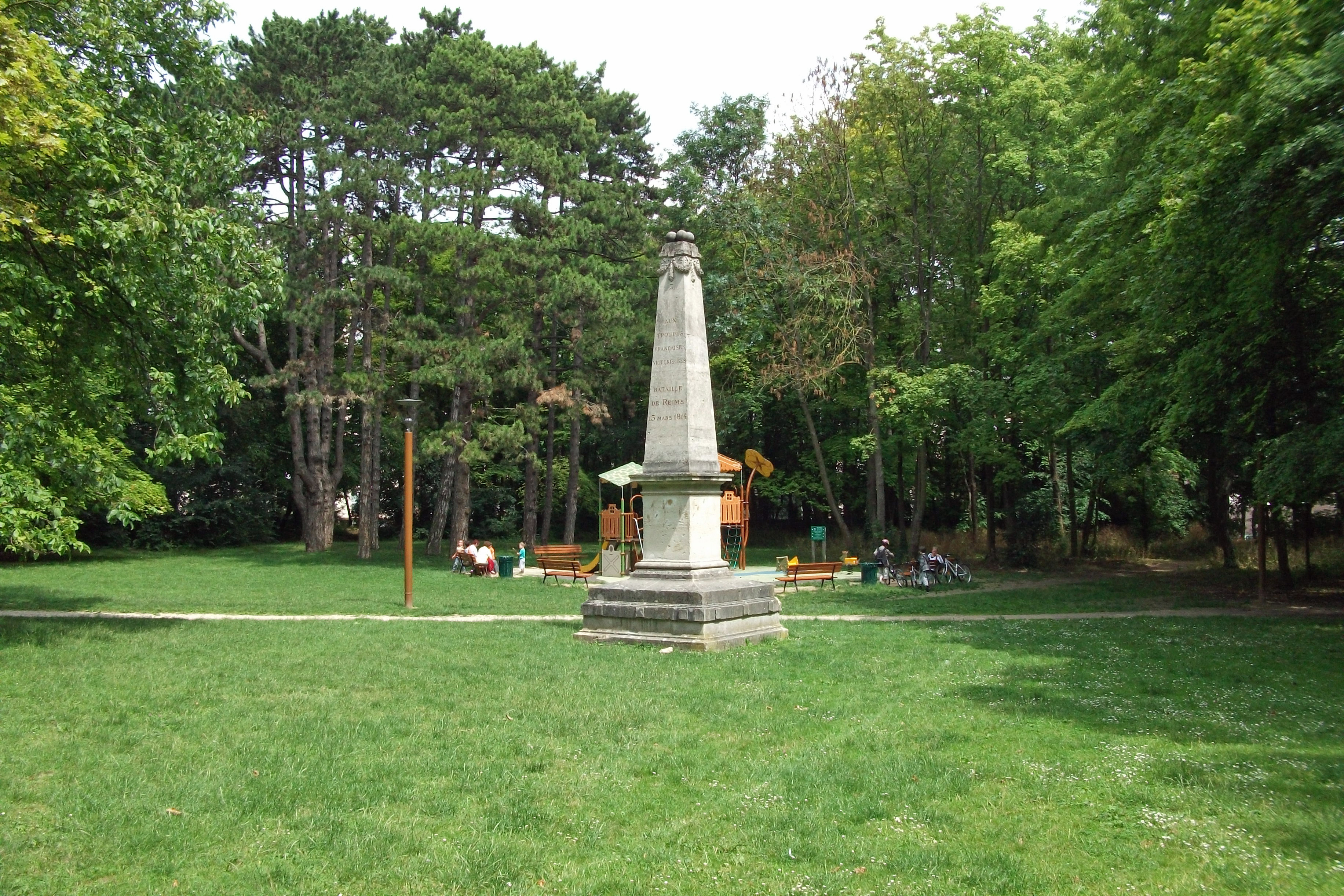 Monument_à la bataille_de_Reims_du 13_mars_1814. Parc de la Cure d'air. Son nom de l'époque était colline ste-Geneviève.